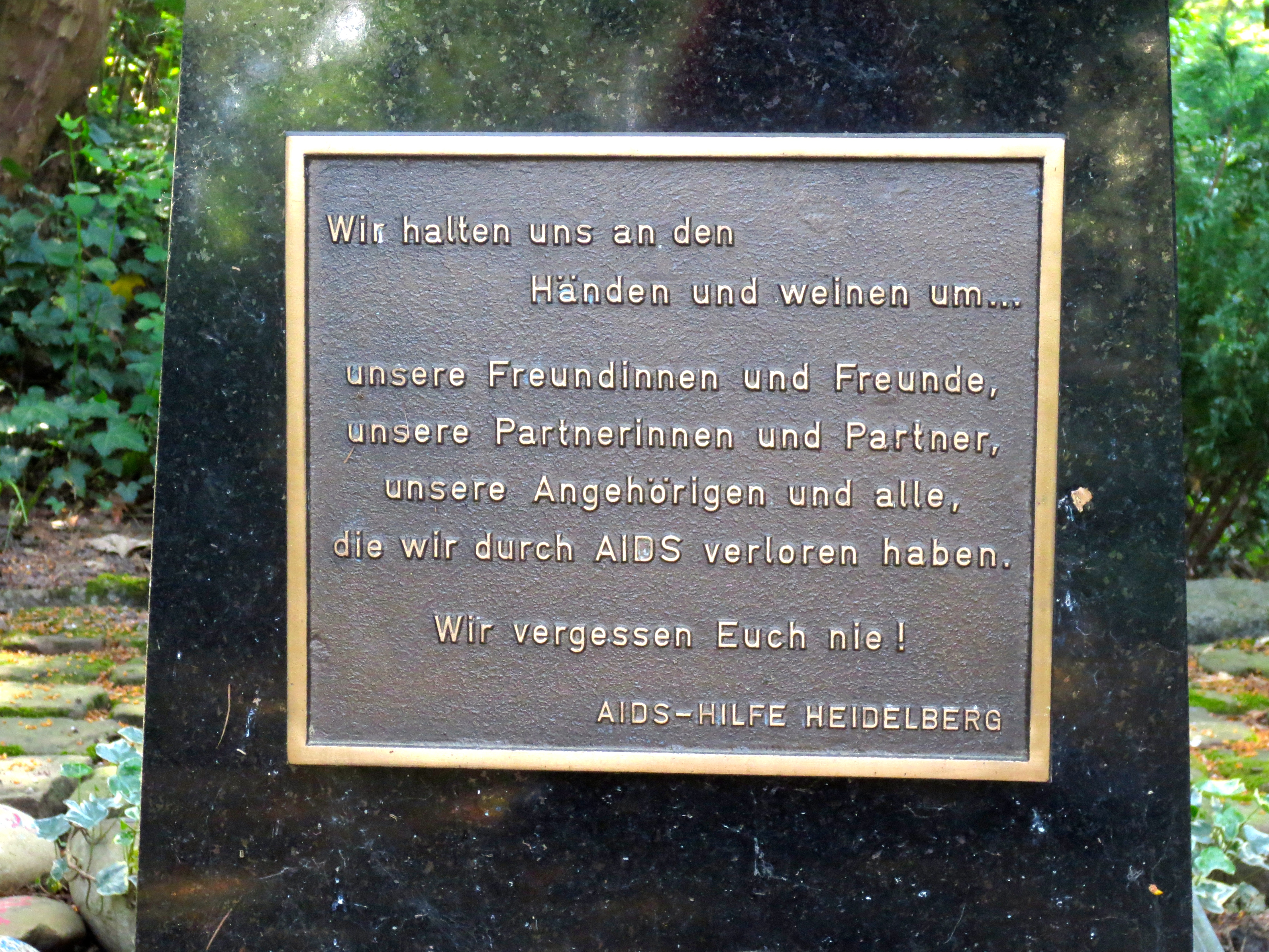 I. Ort des Gedenkens auf dem Bergfriedhof (Heidelberg) für alle die ihre Freunde und Angehörigen durch Aids verloren haben